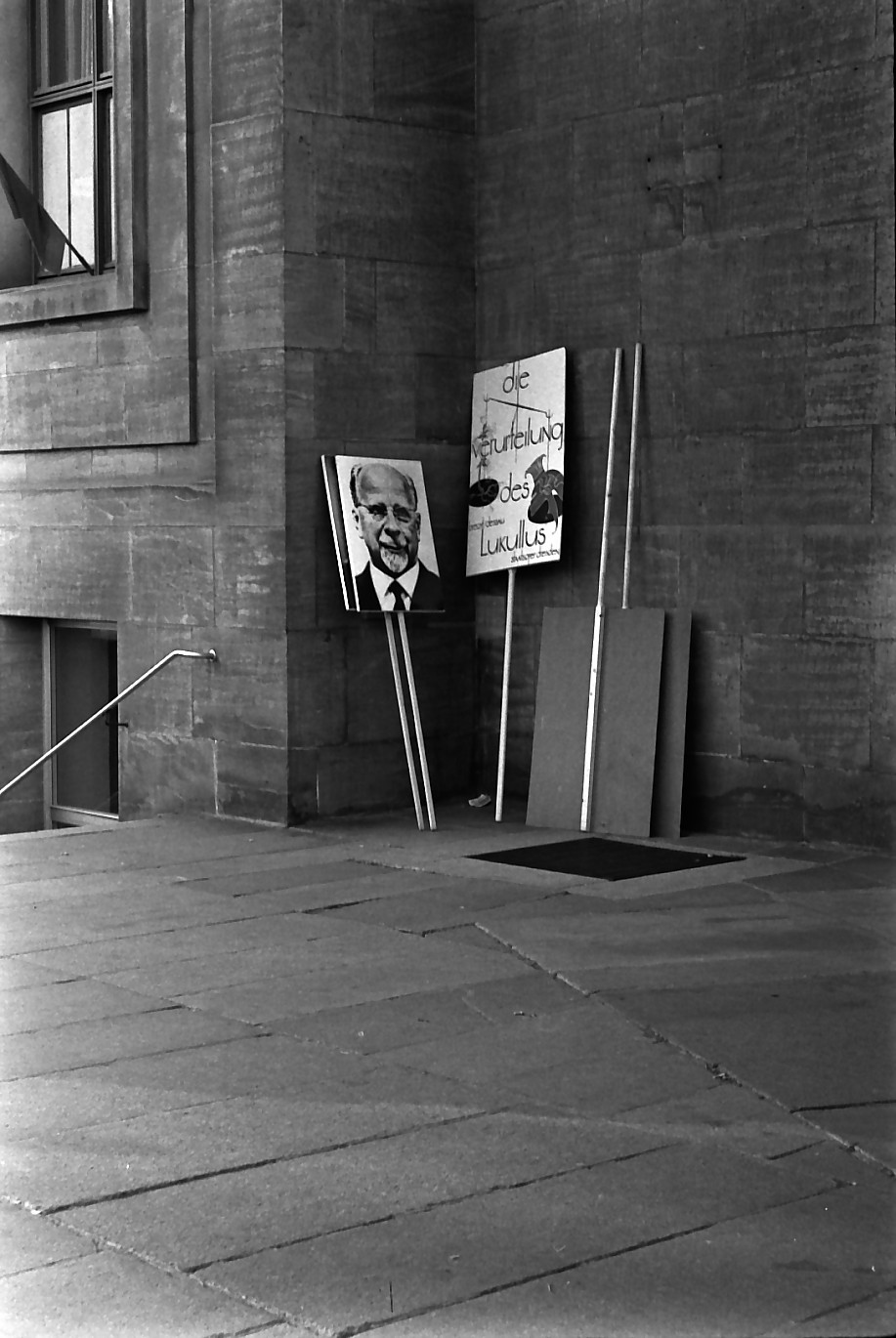 Transparente, Abgestellt am Tag der Republik 7. Oktober 1969 Subversiv dabei der Zusammenhang der Brecht/Dessau-Oper "Die Verurteilung des Lukullus" (Staatsoper Dresden) und dem Foto des Staatsratsvorsitzenden Walter Ulbricht